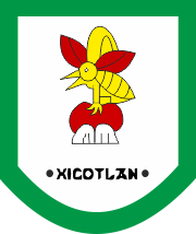 Escudo del municipio de Xicotlán, Puebla, México